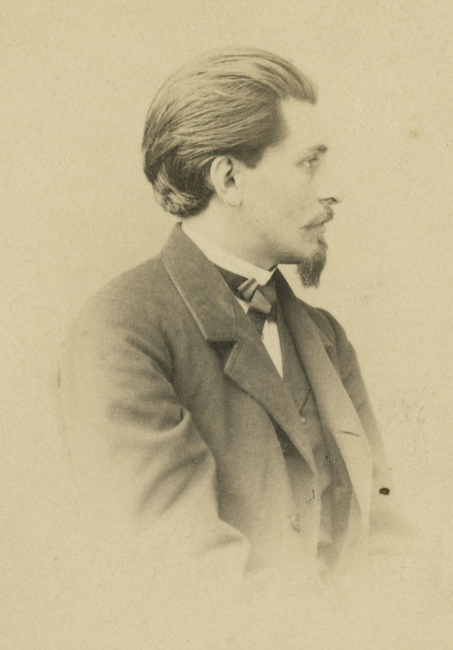 polski lekarz neurolog żydowskiego pochodzenia.